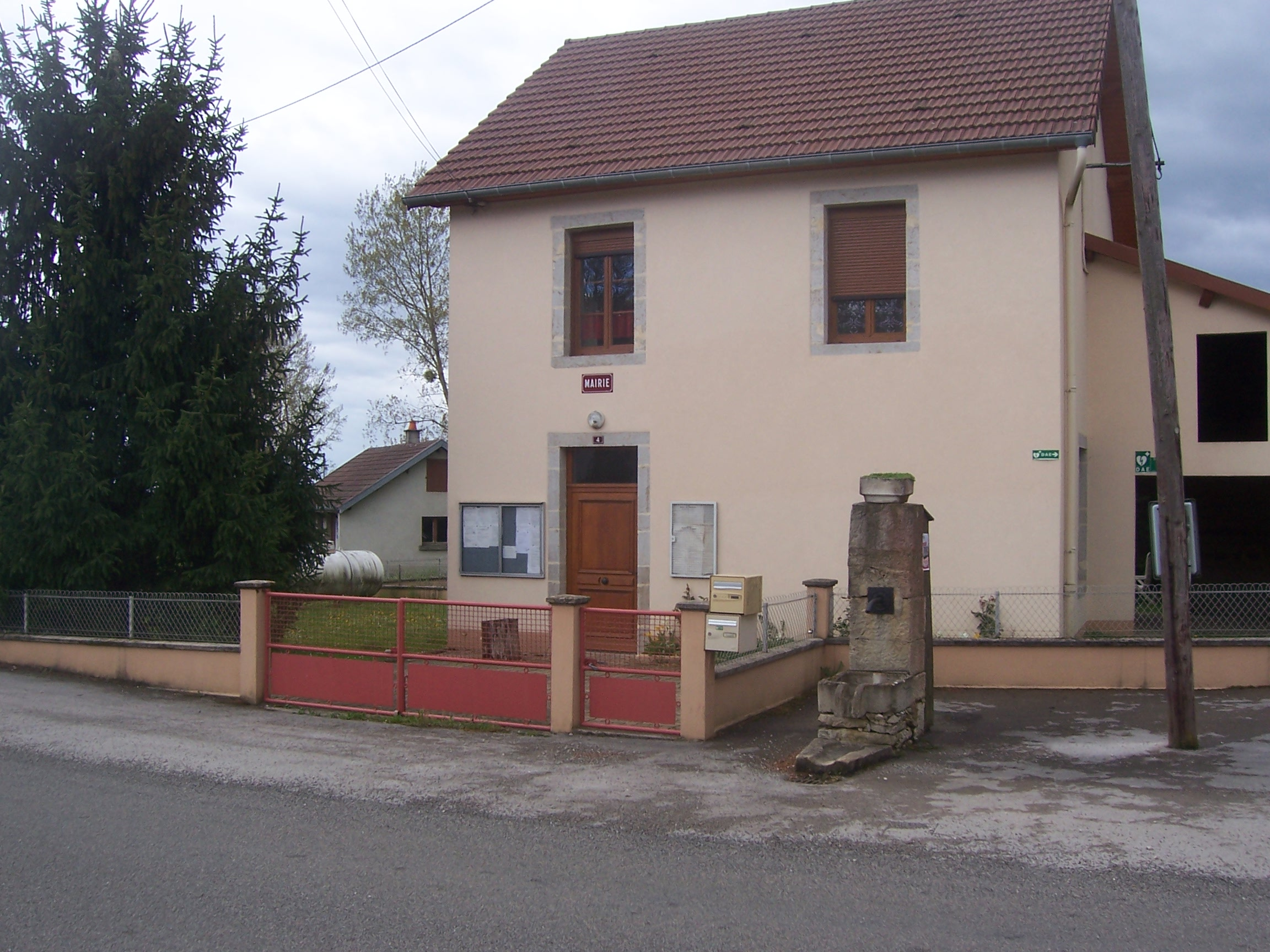 Mairie de La Charme